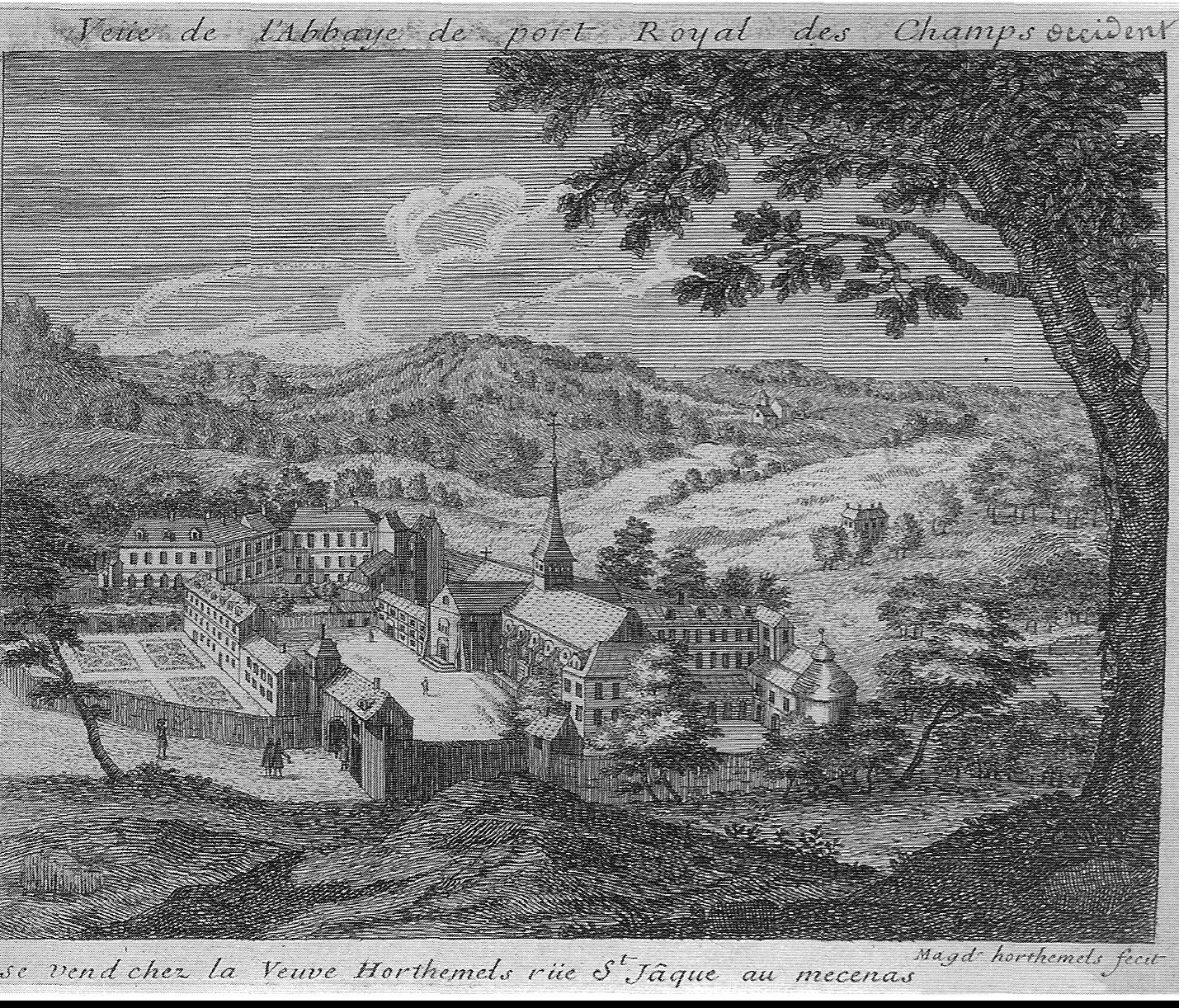 Vue du monastère de Port-Royal des Champs par Magdeleine Hortemels